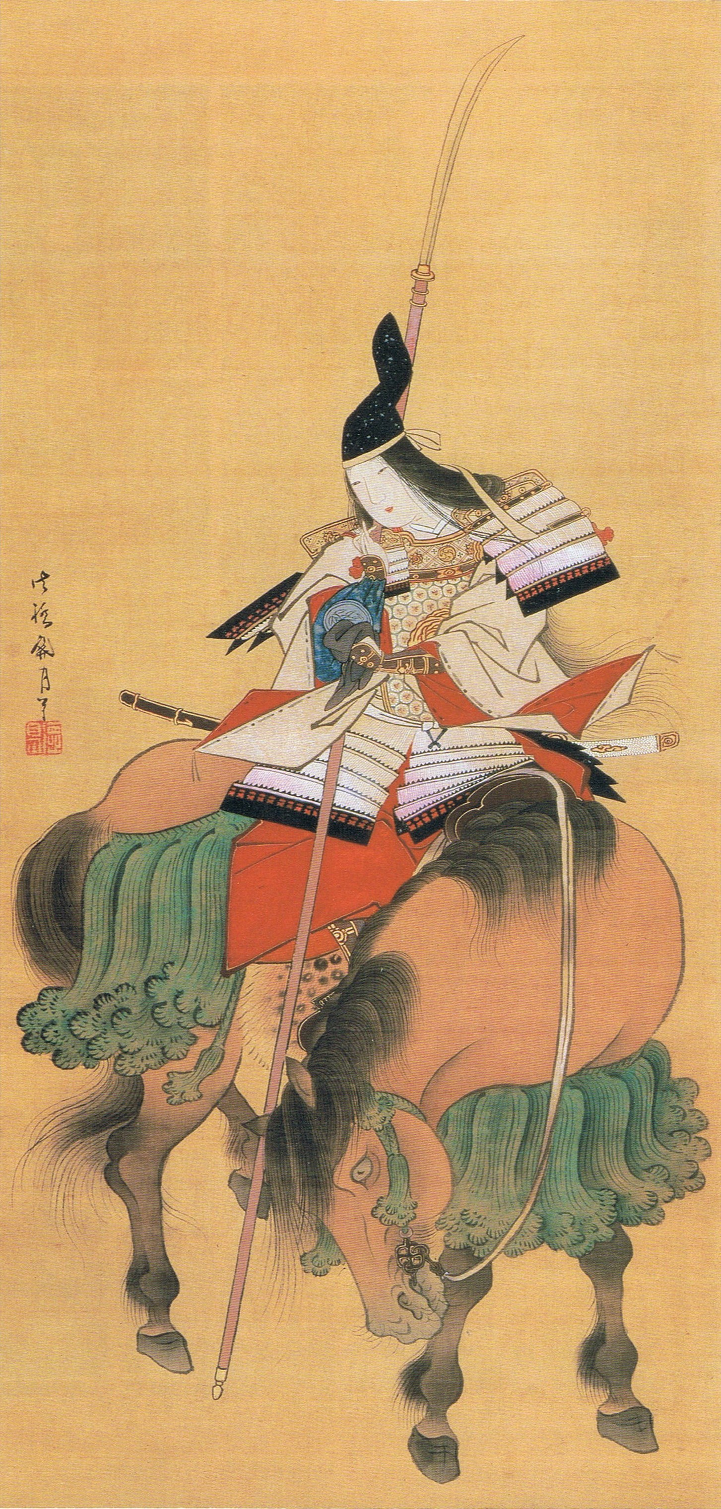 絹本著色 『巴御前出陣図』